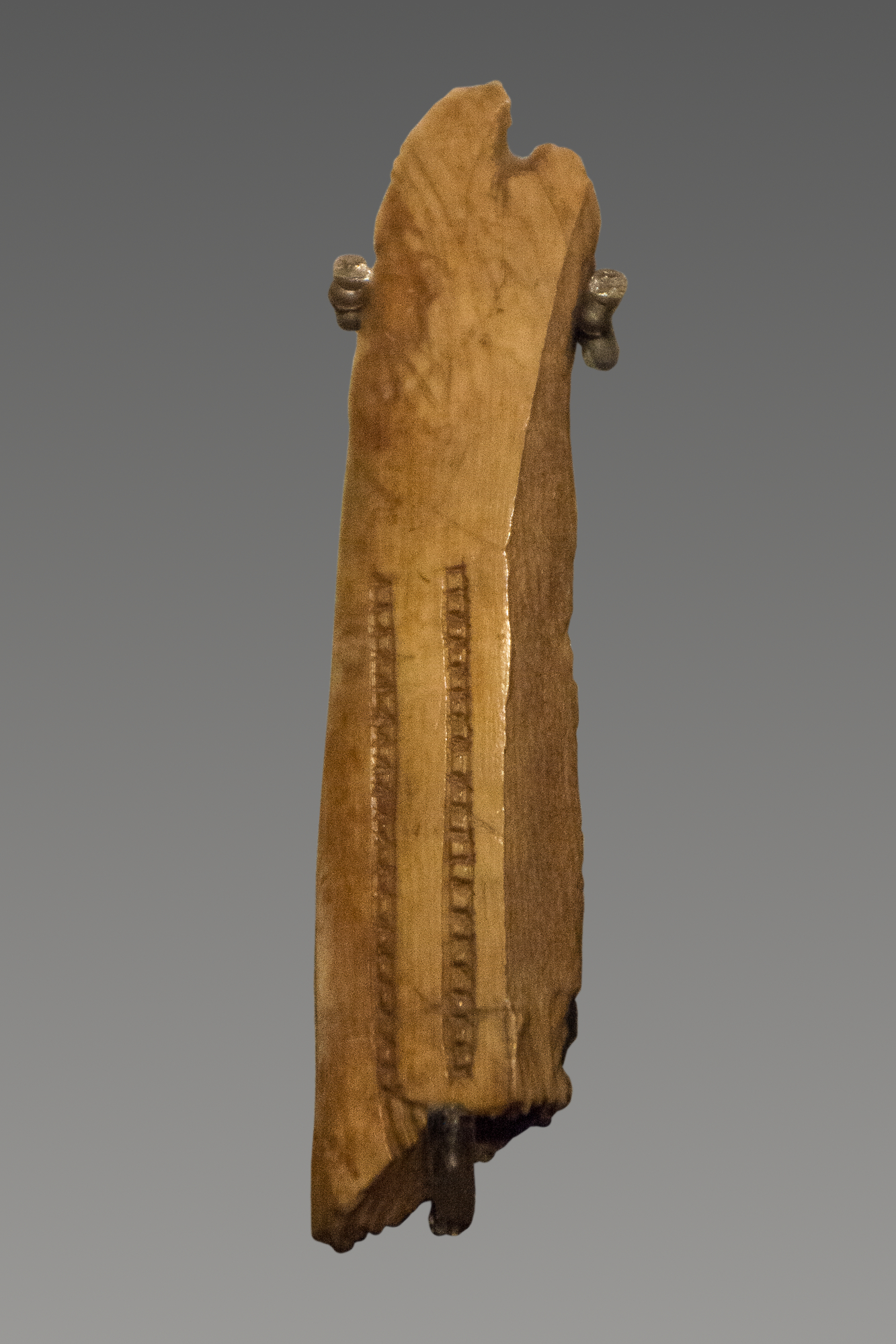 Knöcherner Anhänger aus der Jankovich-Höhle, Grabung 1916, ausgestellt im Ungarischen Nationalmuseum in Budapest.